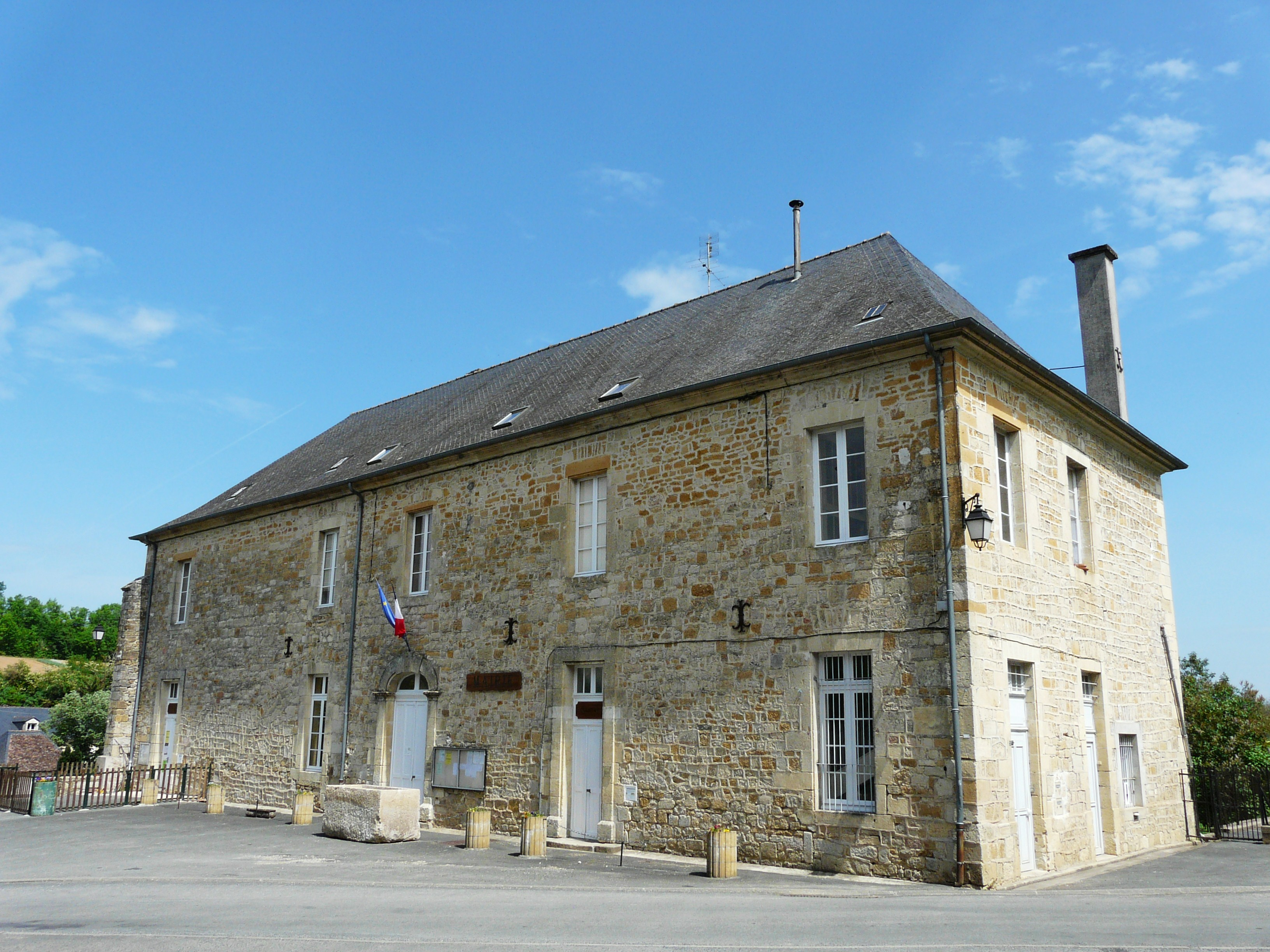 La mairie d'Azerat, Dordogne, France.